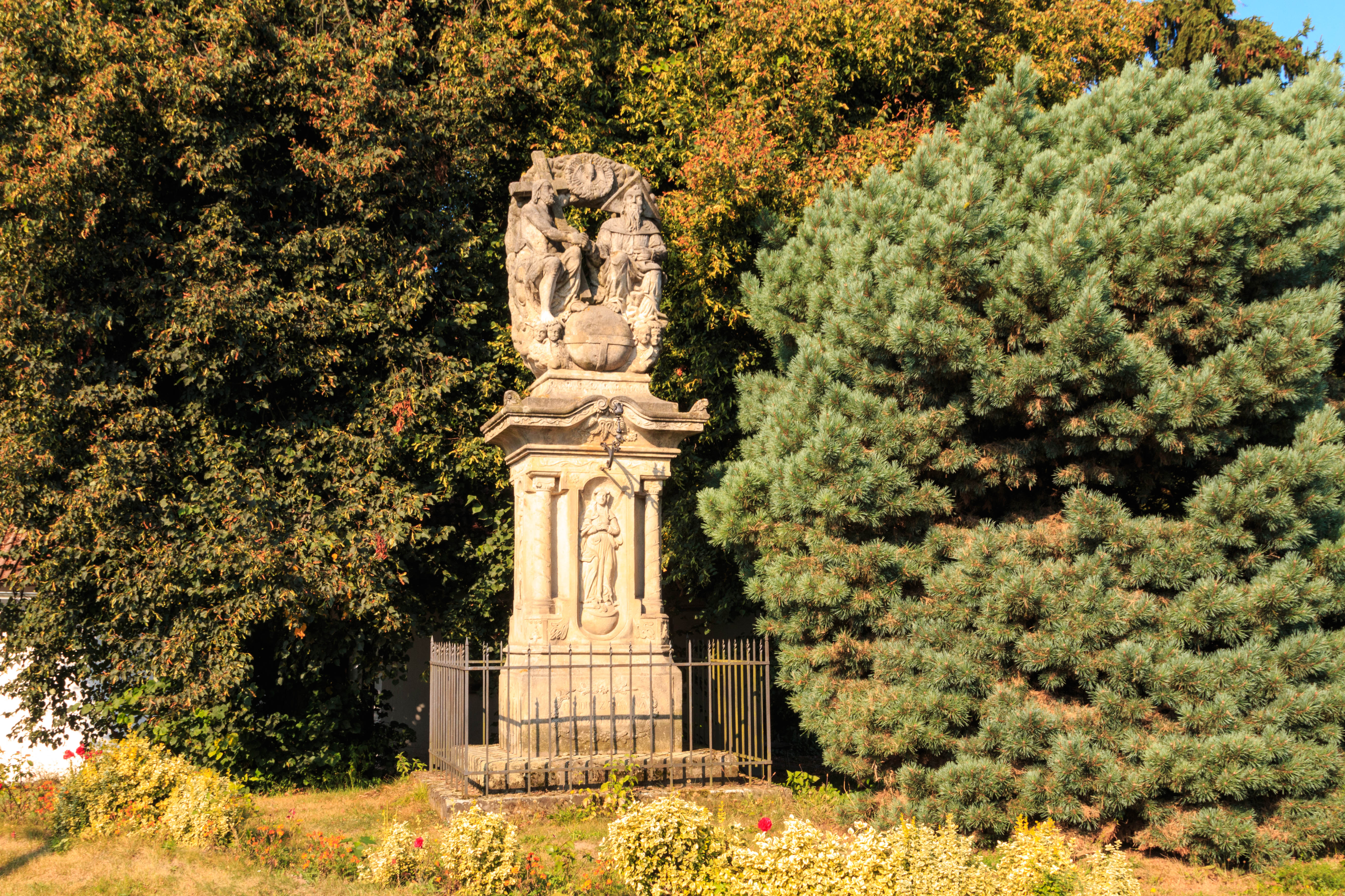 Sloup se sousoším Nejsvětější Trojice, náves, proti domu čp. 10, Dolní Podůlší.